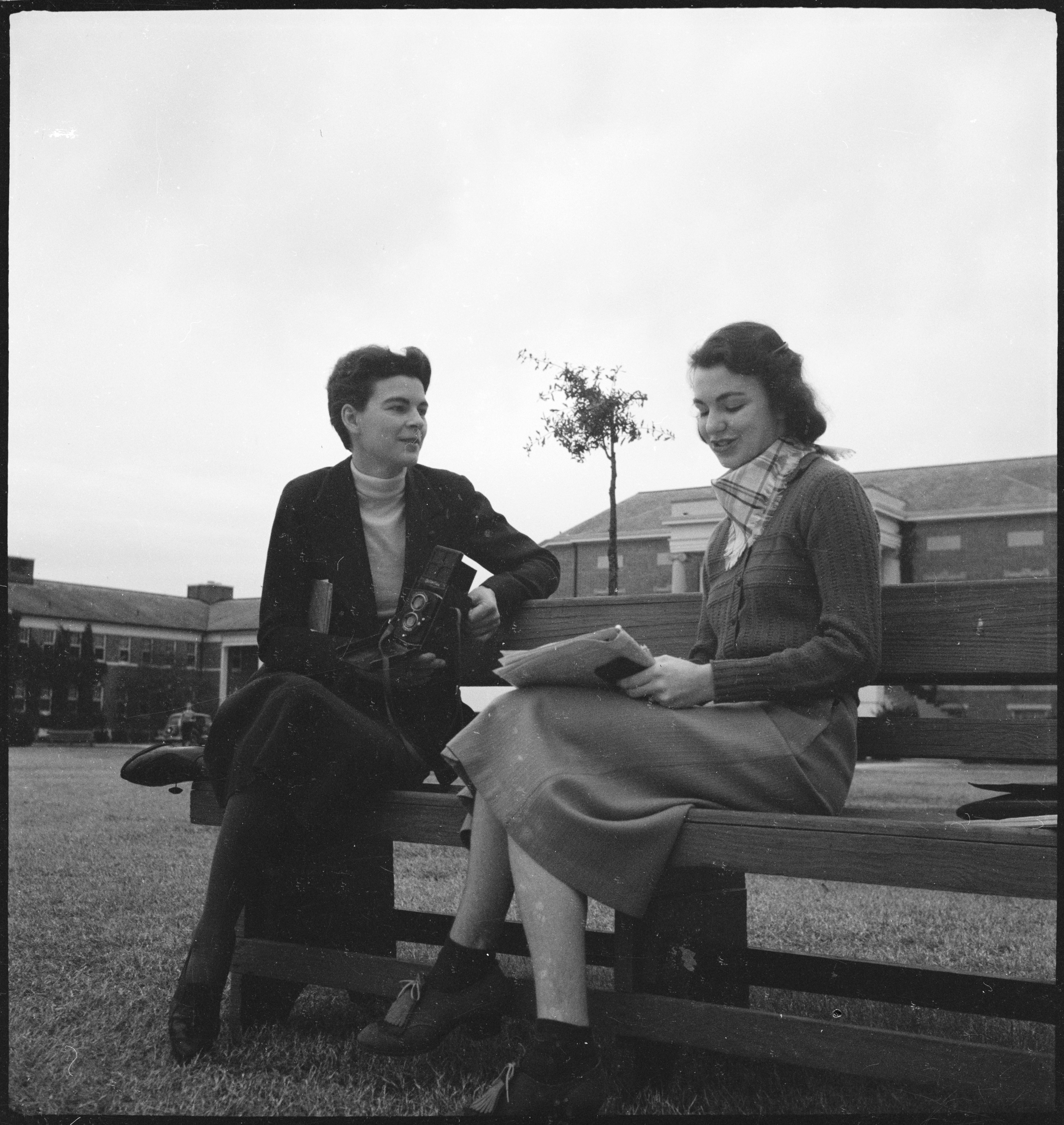 USA, Macon/GA: Wesleyan College; Barbara Hamilton-Wright im Gespräch mit einer Schülerin